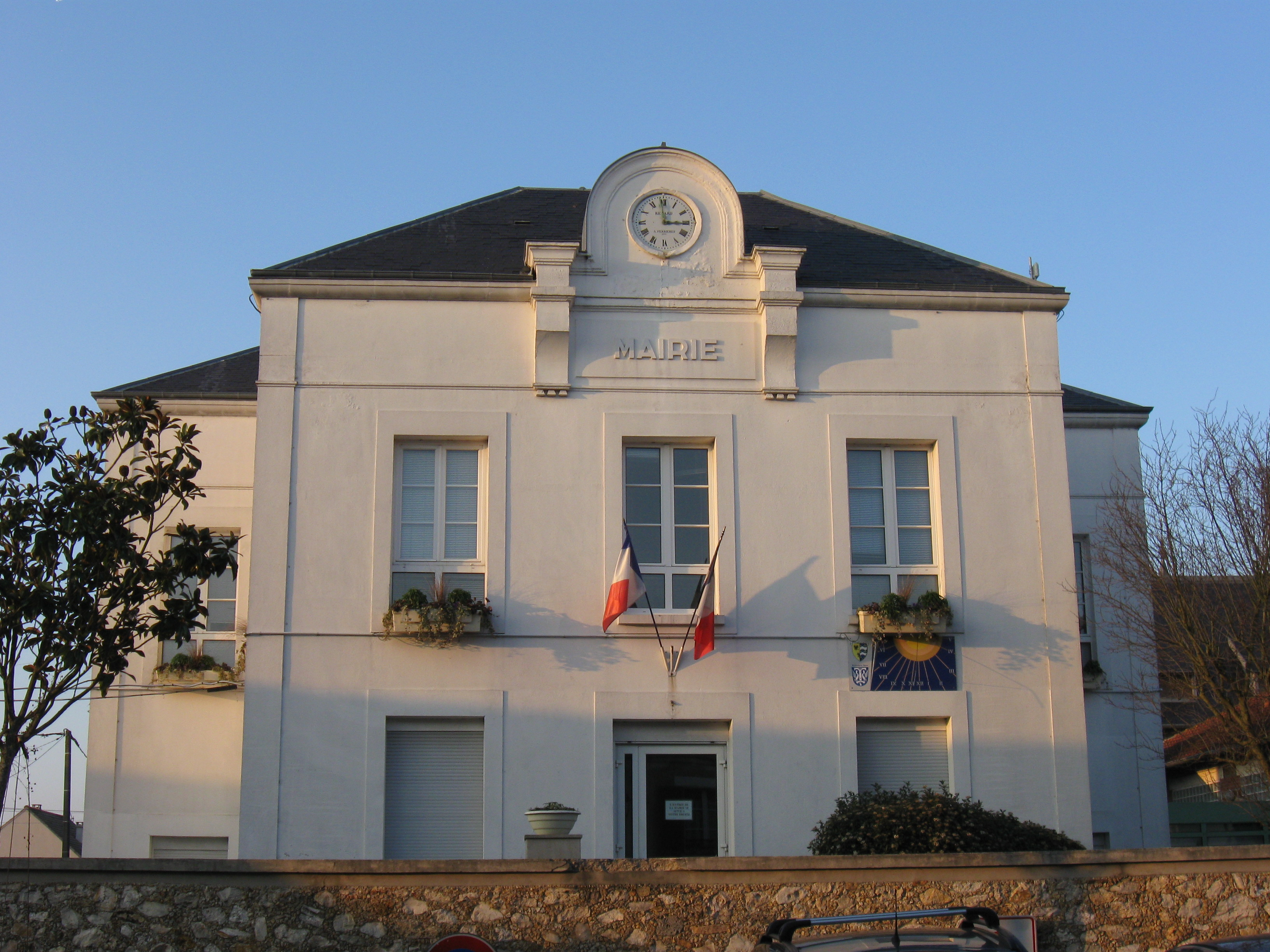 Mairie de Montévrain. (Seine-et-Marne, région Île-de-France).